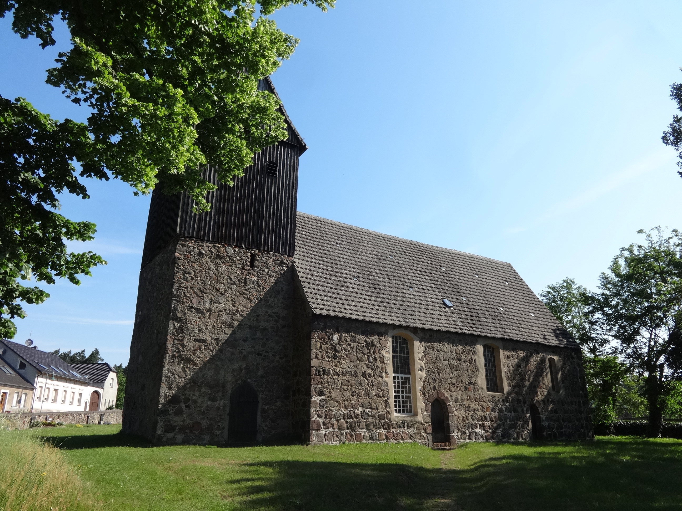 Die Dorfkirche in Kemlitz (Baruth/Mark) ist eine Feldsteinkirche aus der Zeit um 1300. Im Innern befindet sich eine schlichte Ausstattung, die überwiegend aus dem 18. Jahrhundert stammt.